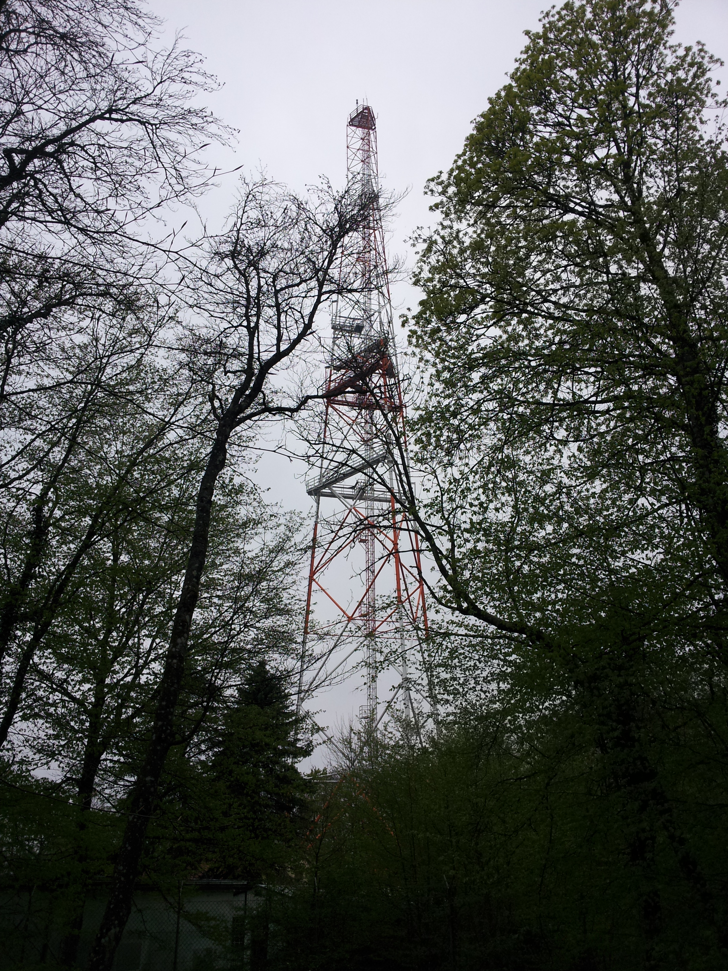 Funkmast auf dem Dürrenberg.